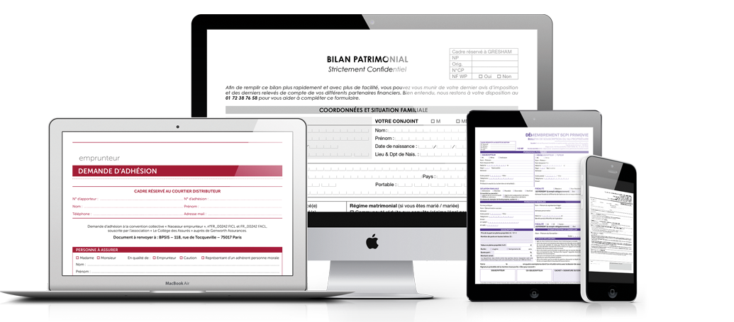 Support PDF interactif